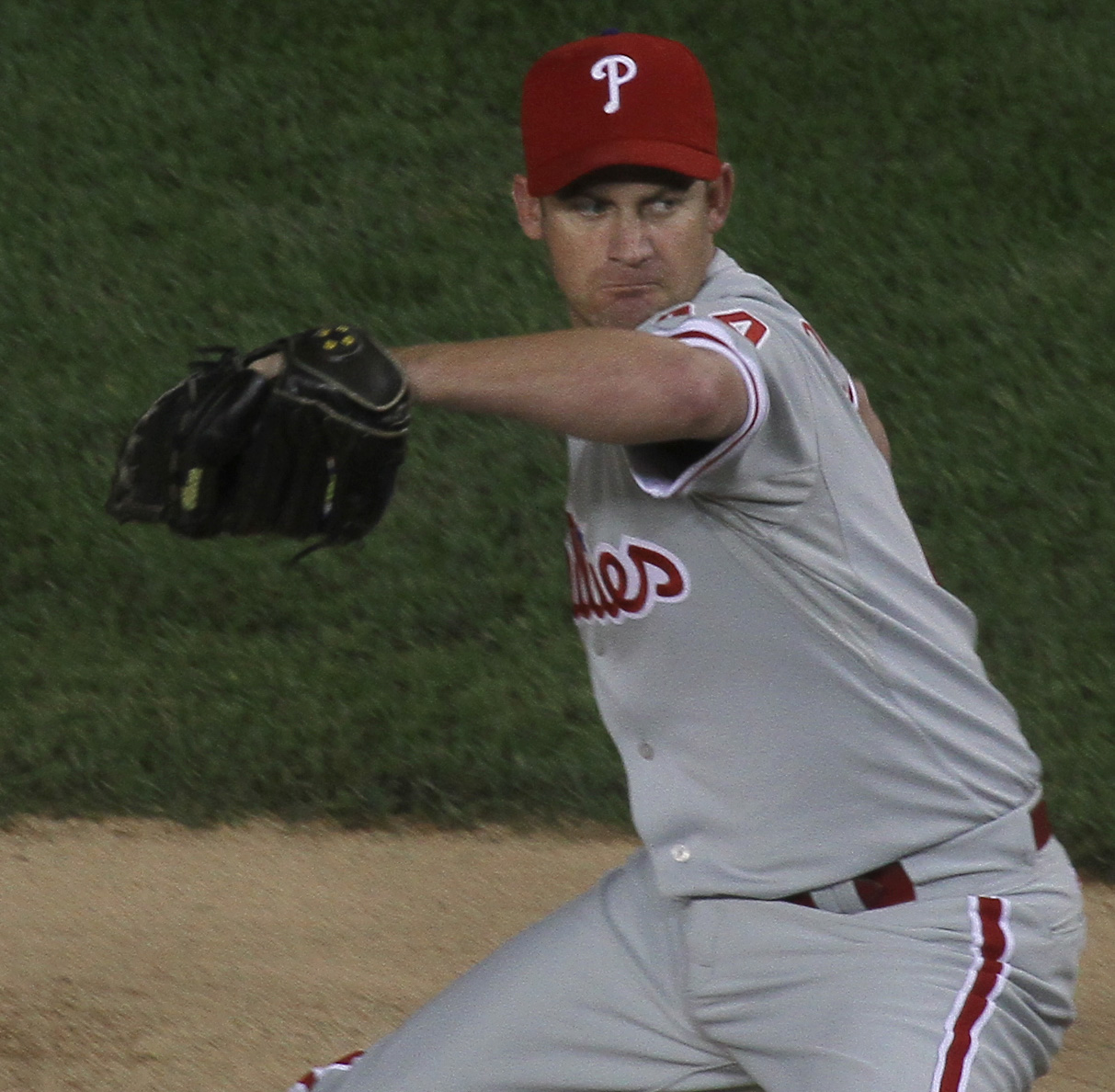 Roy Oswalt